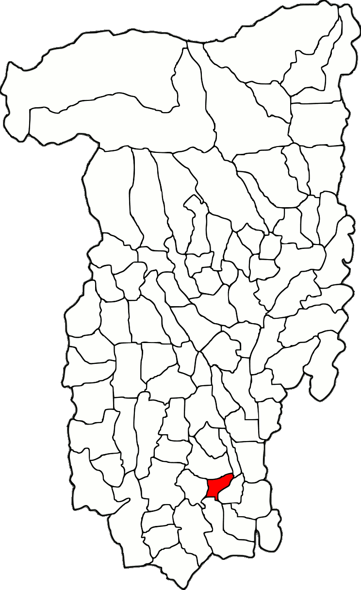 Lage der Gemeinde Crețeni im Kreis Vâlcea (RO).